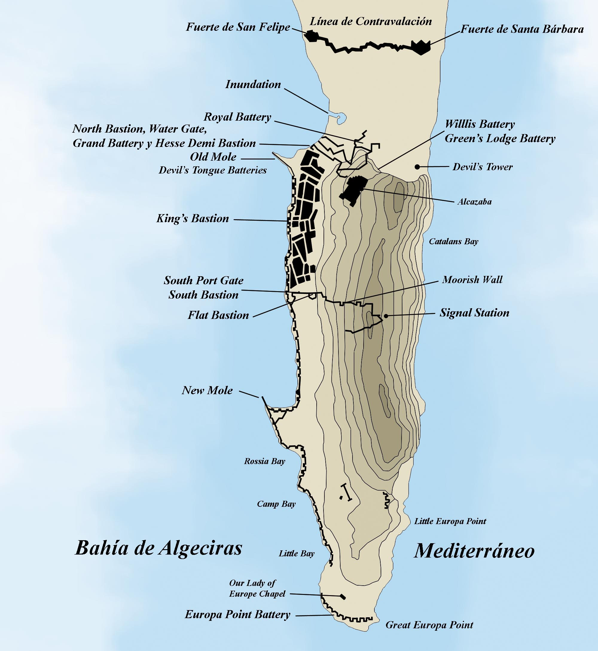 Defensas de Gibraltar creadas a partir de 1704 bajo dominio británico.